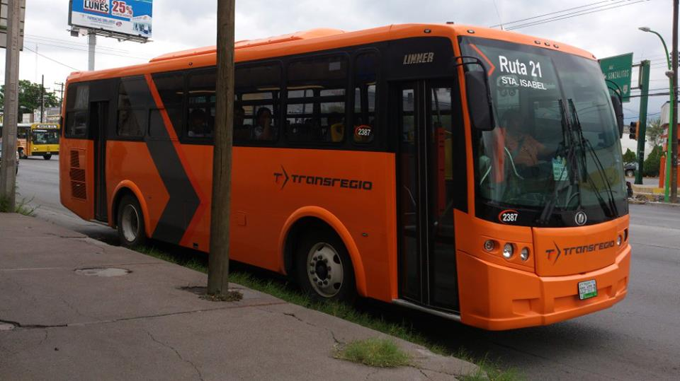 Ruta 21 Barrio Santa Isabel de Transregio